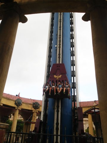 Горка El Vuelo del Fénix в Терра Митика